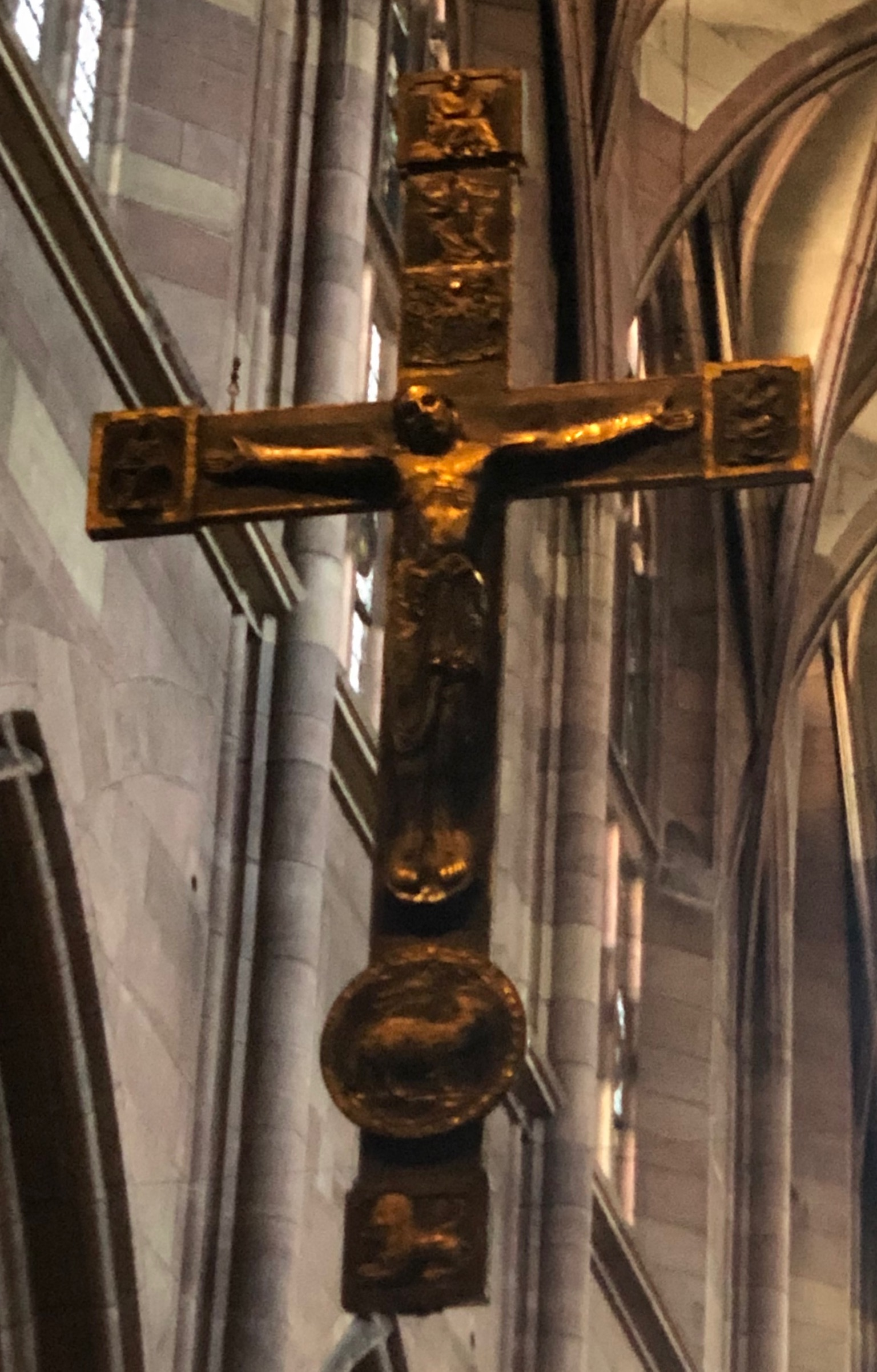 Spätromanisches Böcklin- Kreuz im Hochchor des Freiburger Münsters